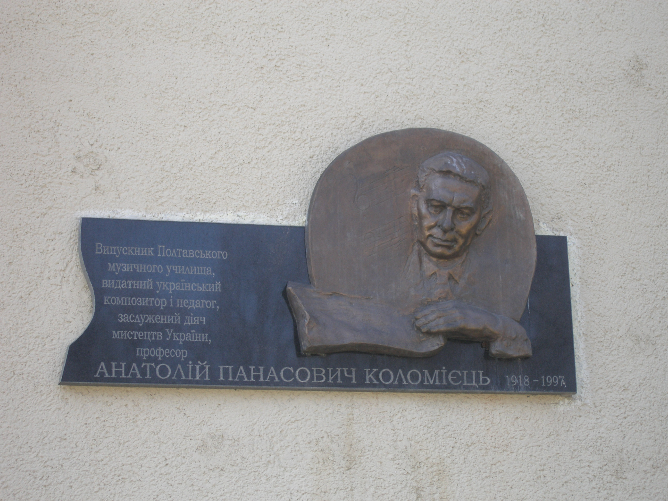 Випускник Полтавського муз.училища А.П.Коломієць 1918-1997